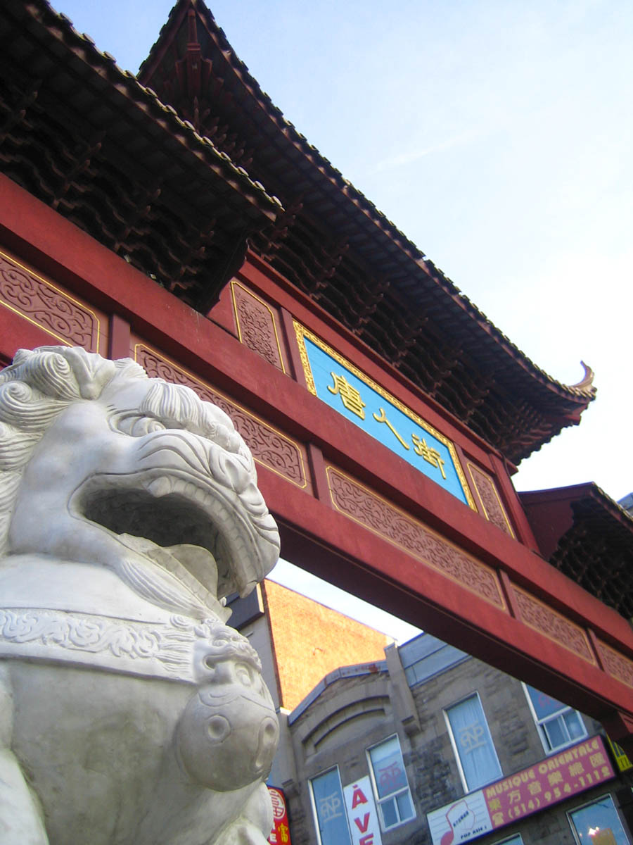 Quartier chinois de Montréal (photo personnel 2005)